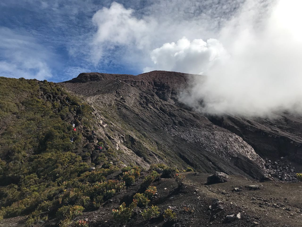 Gunung Kerinci